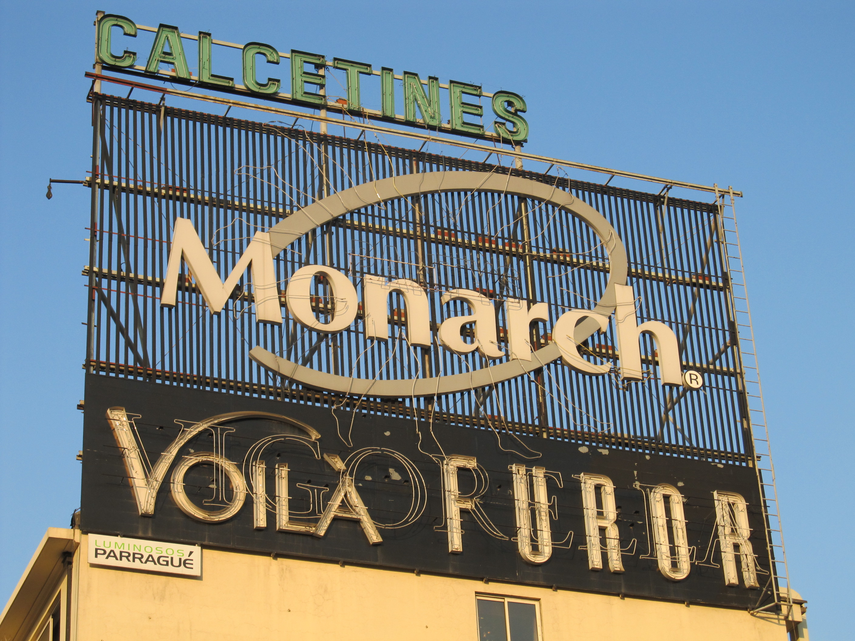 Letrero publicitario de “Monarch” This is a photo of a national monument in Chile: 2168